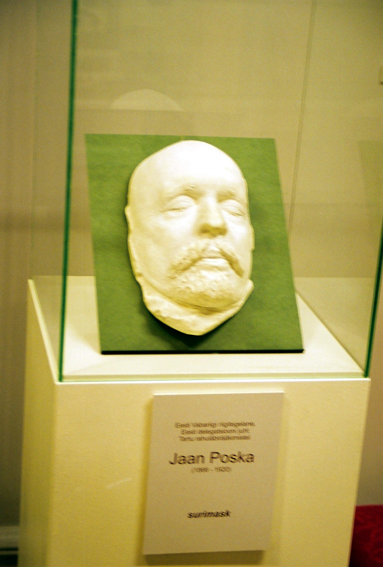 Jaan Poska surimask Tartu linnamuuseumis, 2007